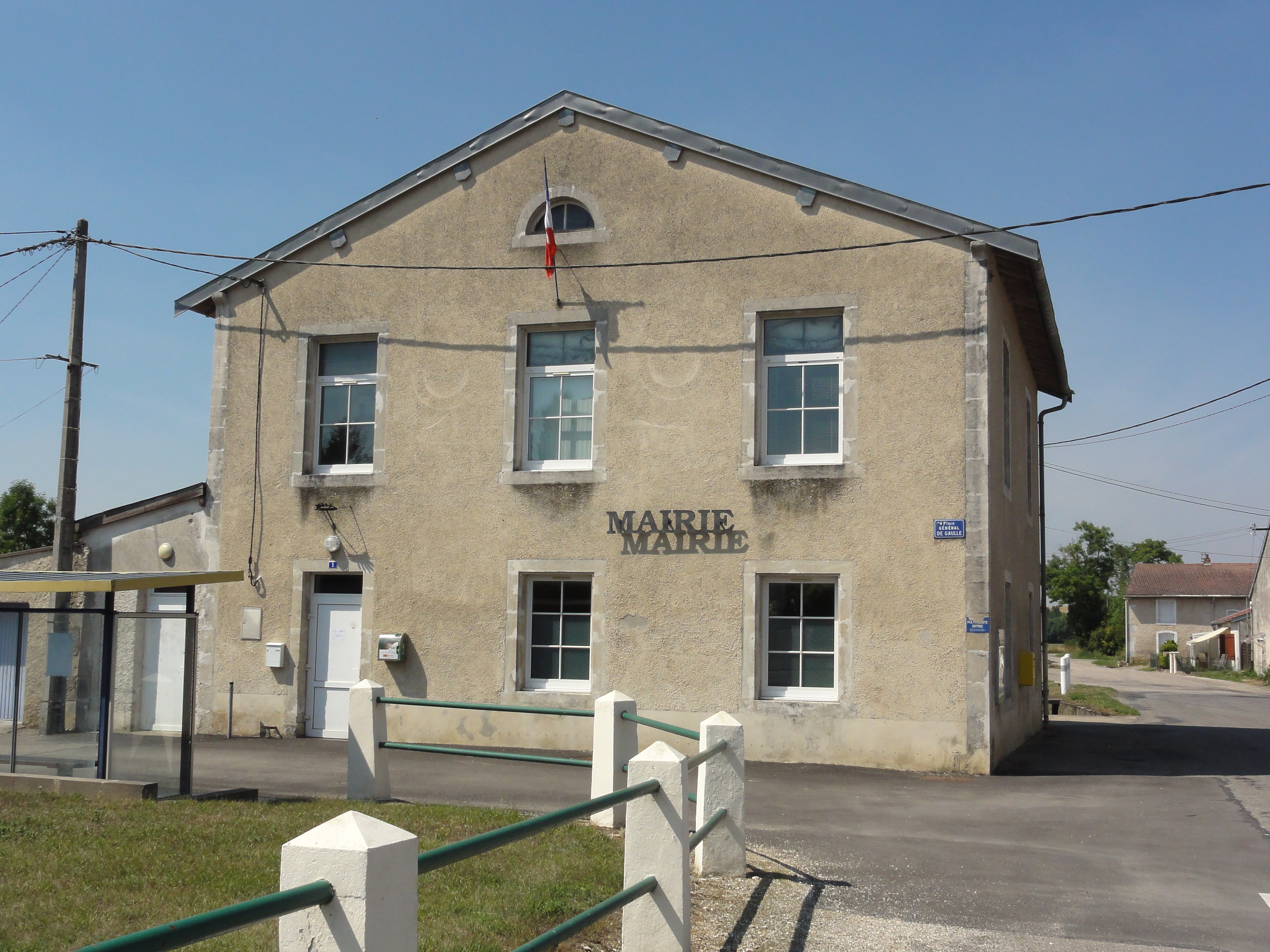 Mécrin (Meuse) mairie